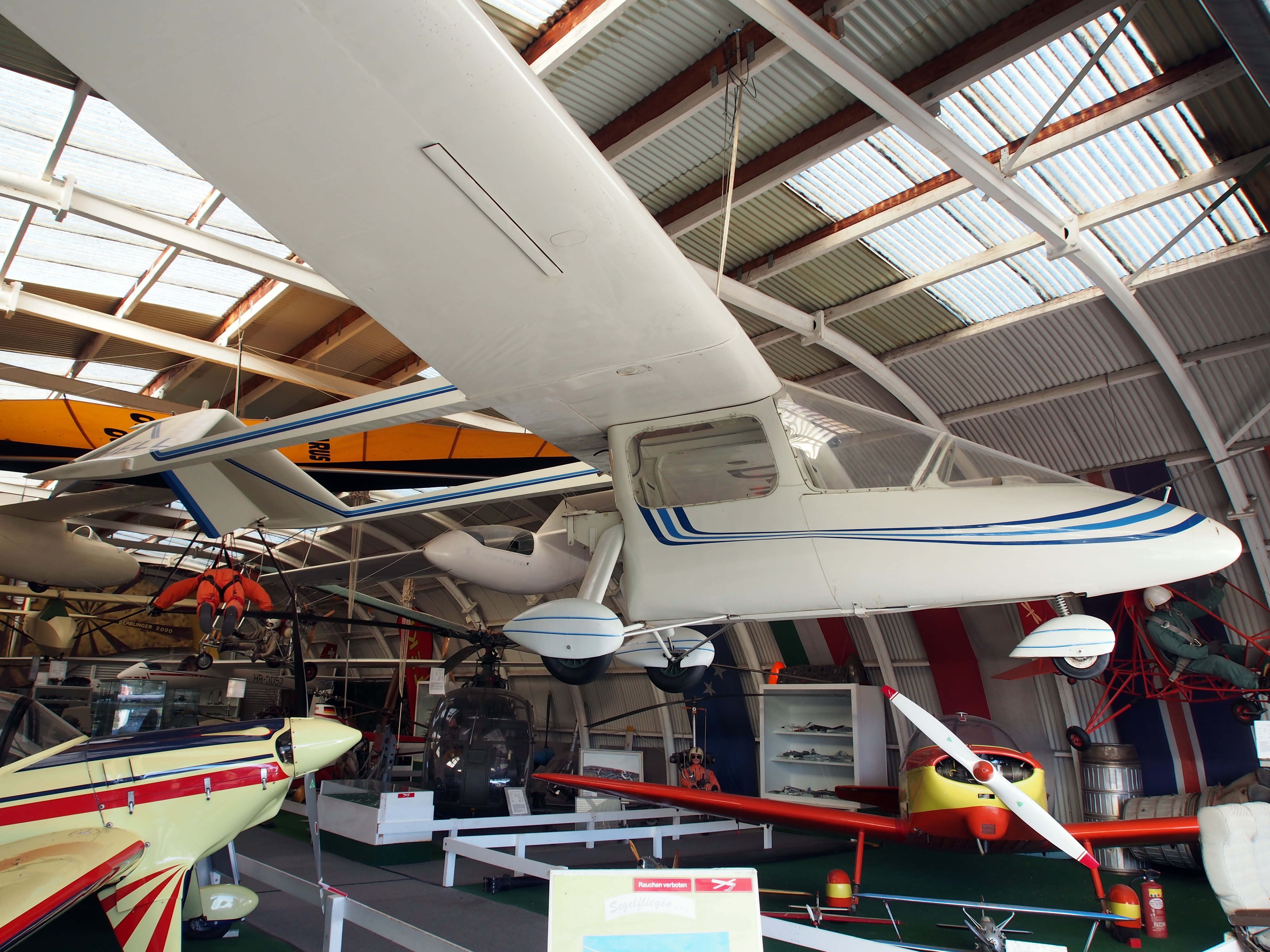 Photographed at the Luftfahrtmuseum Villingen-Schwenningen.